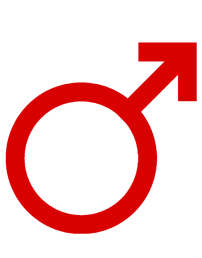 Symbole du Masculin et de l'astre Mars